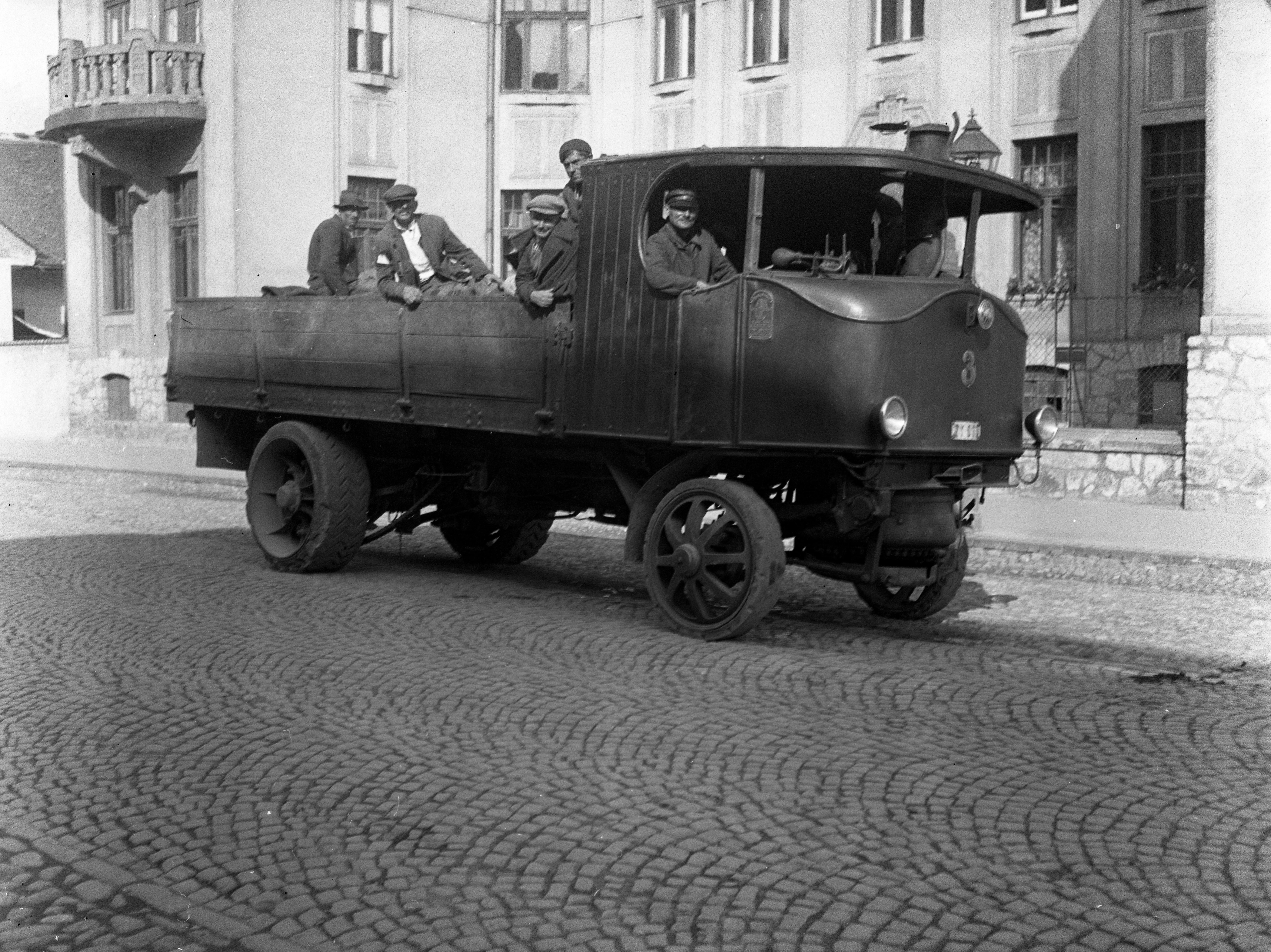 ulica Komenského 3., Škoda Sentinel gőzüzemű teherautó. Location: Slovakia, Kosice Tags: steam vehicle, Skoda-brand, number plate, cobblestones, commercial vehicle Title: ulica Komenského 3., Škoda Sentinel gőzüzemű teherautó.